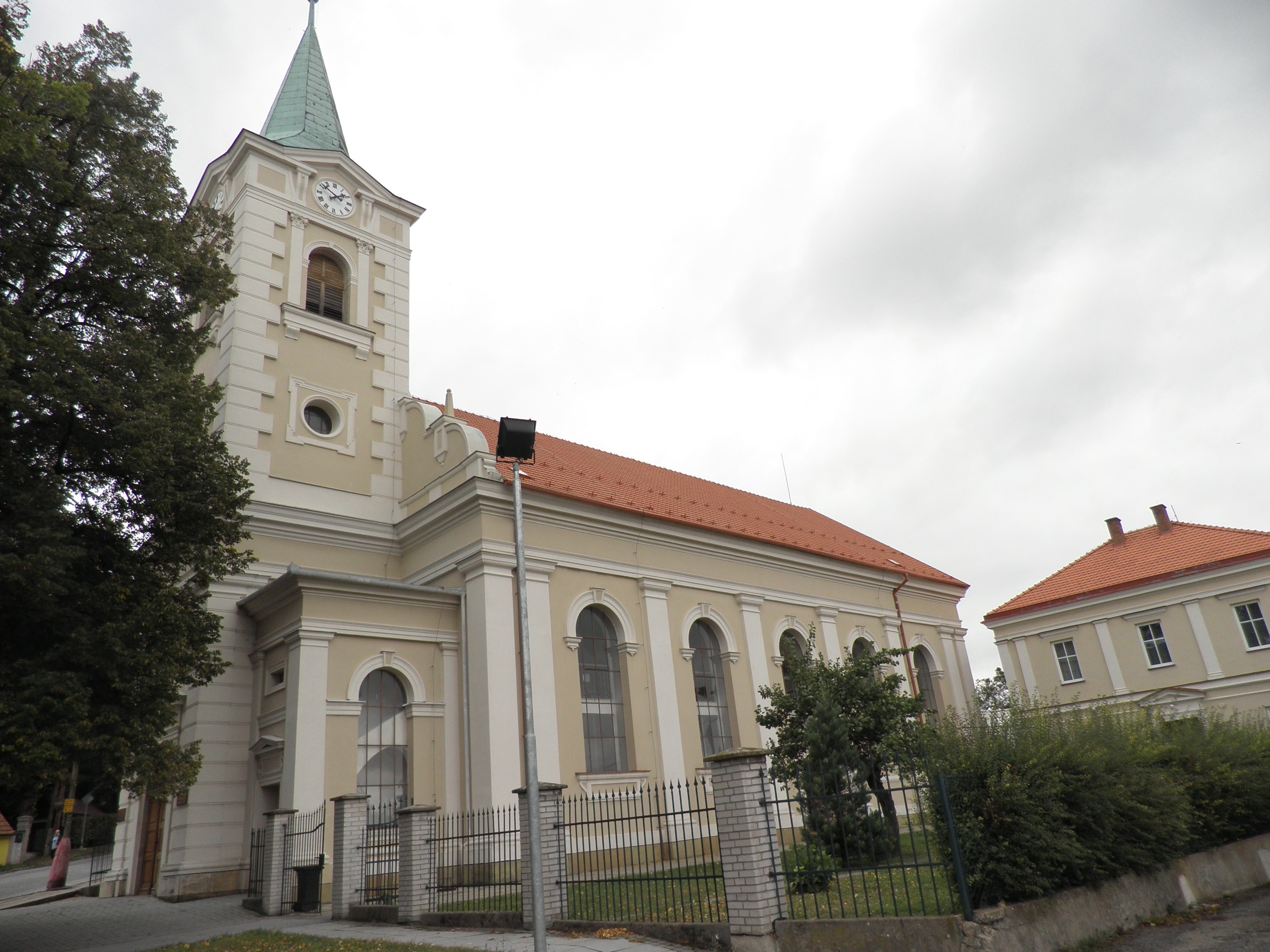 Kostel evangelický (Klobouky u Brna), Brněnská, Klobouky u Brna